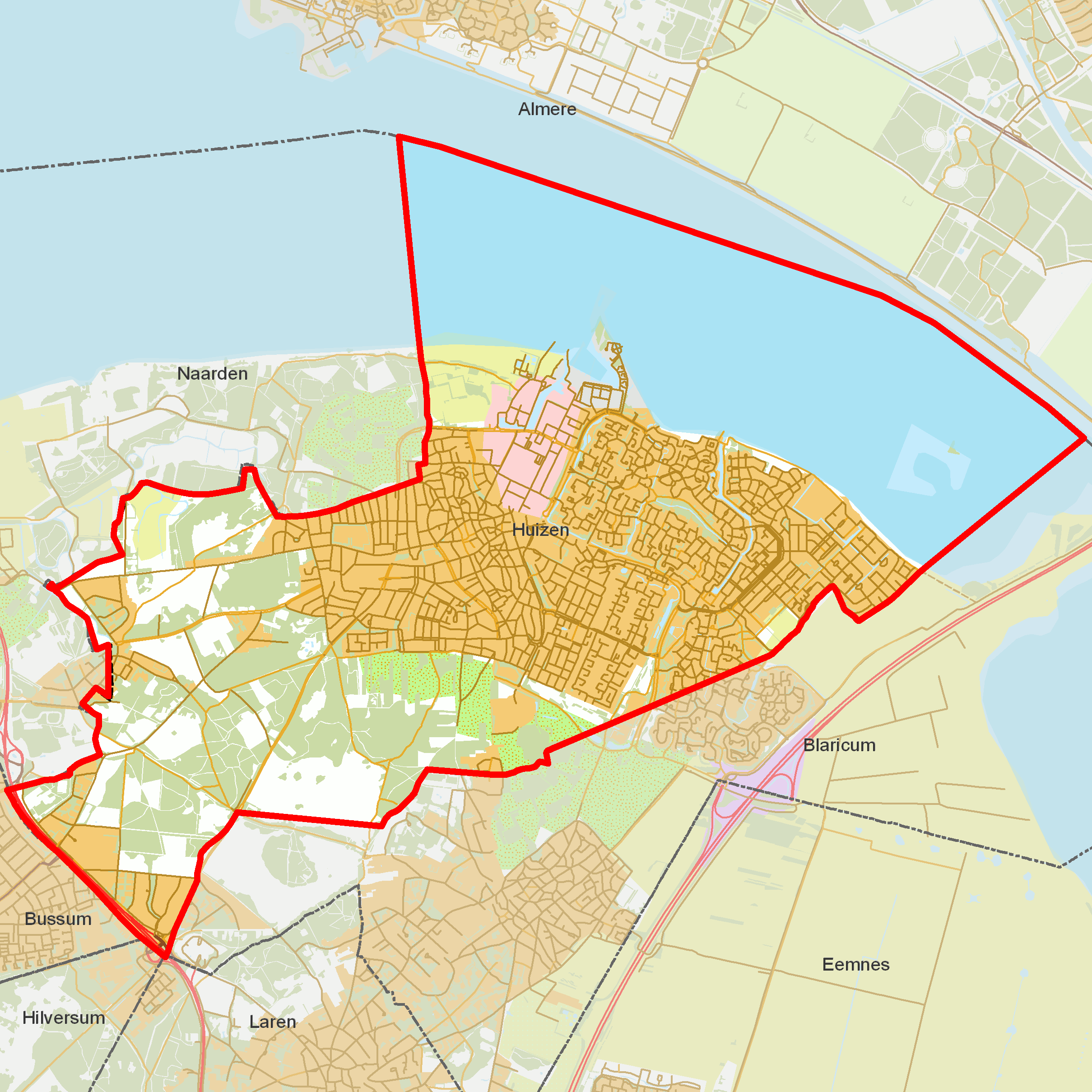 BAG woonplaatsen - Gemeente Huizen.png